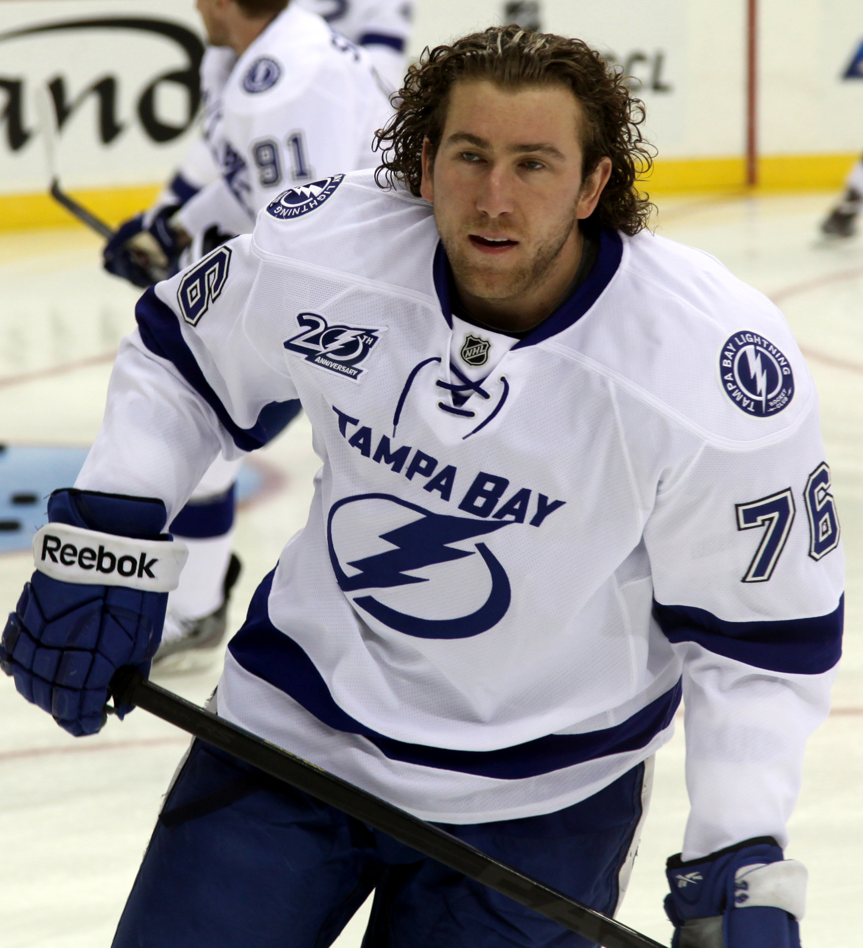 Labrie in 2013.